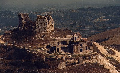 Vista area della sommità di Monte Castello